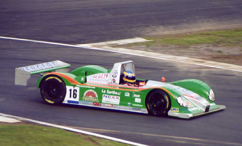 Photographie de la Courage C60 engagée par Pescarolo Sport, pilotée par Sébastien Bourdais, Jean-Christophe Bouillon et Laurent Redon aux 1 000 kilomètres de Monza.